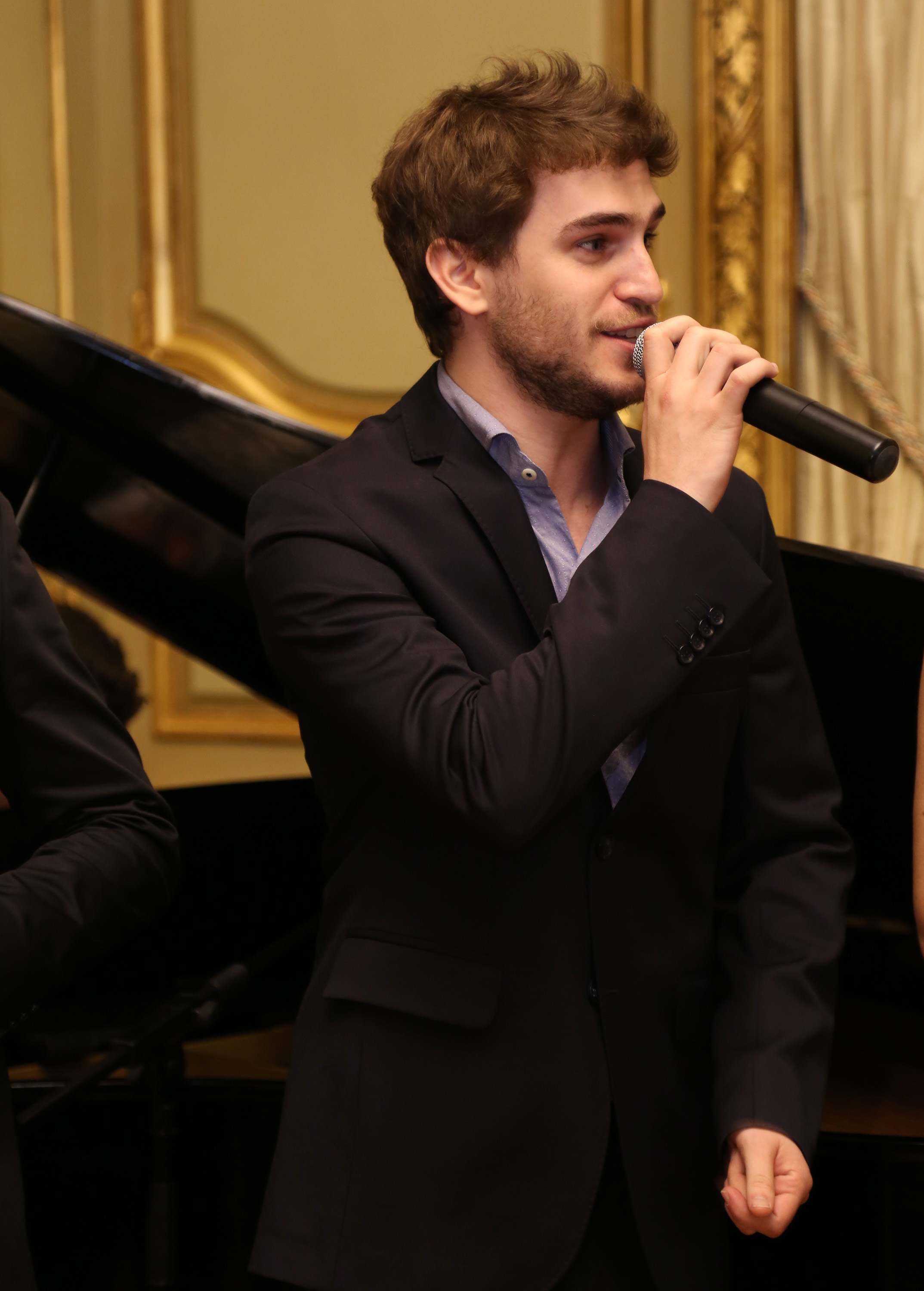 Matías Mayer en el Palacio Bosch en 2015.